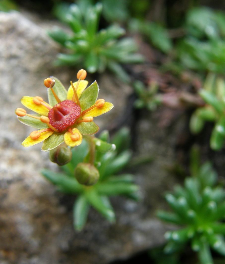 Fetthennen-Steinbrech (Saxifraga aizoides). Aufnahmeort: Gottesackerplateau im Kleinwalsertal, Höhe: ca. 1900 m